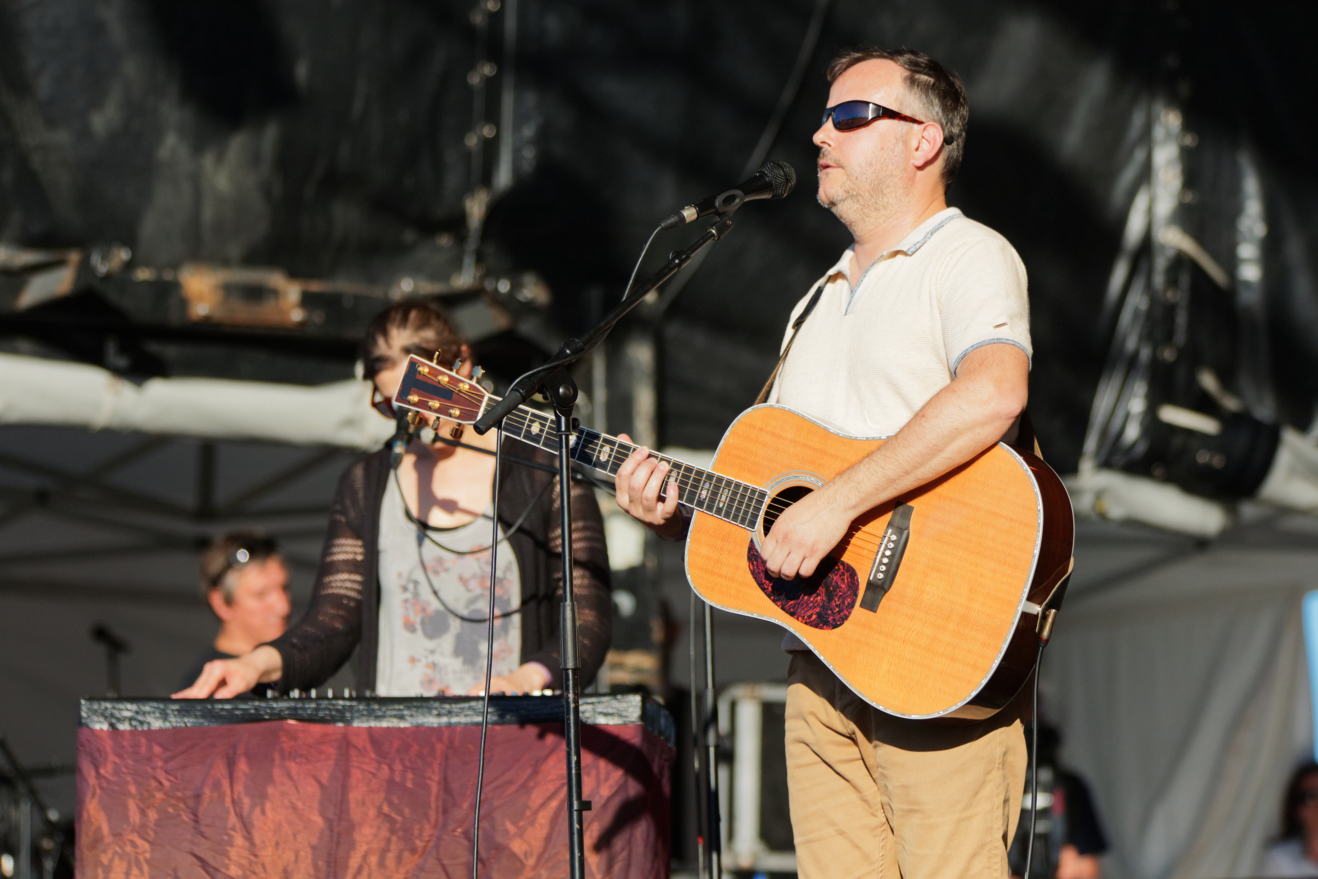 Mickey 3D en concert sur la grande scène de Brest 2016.